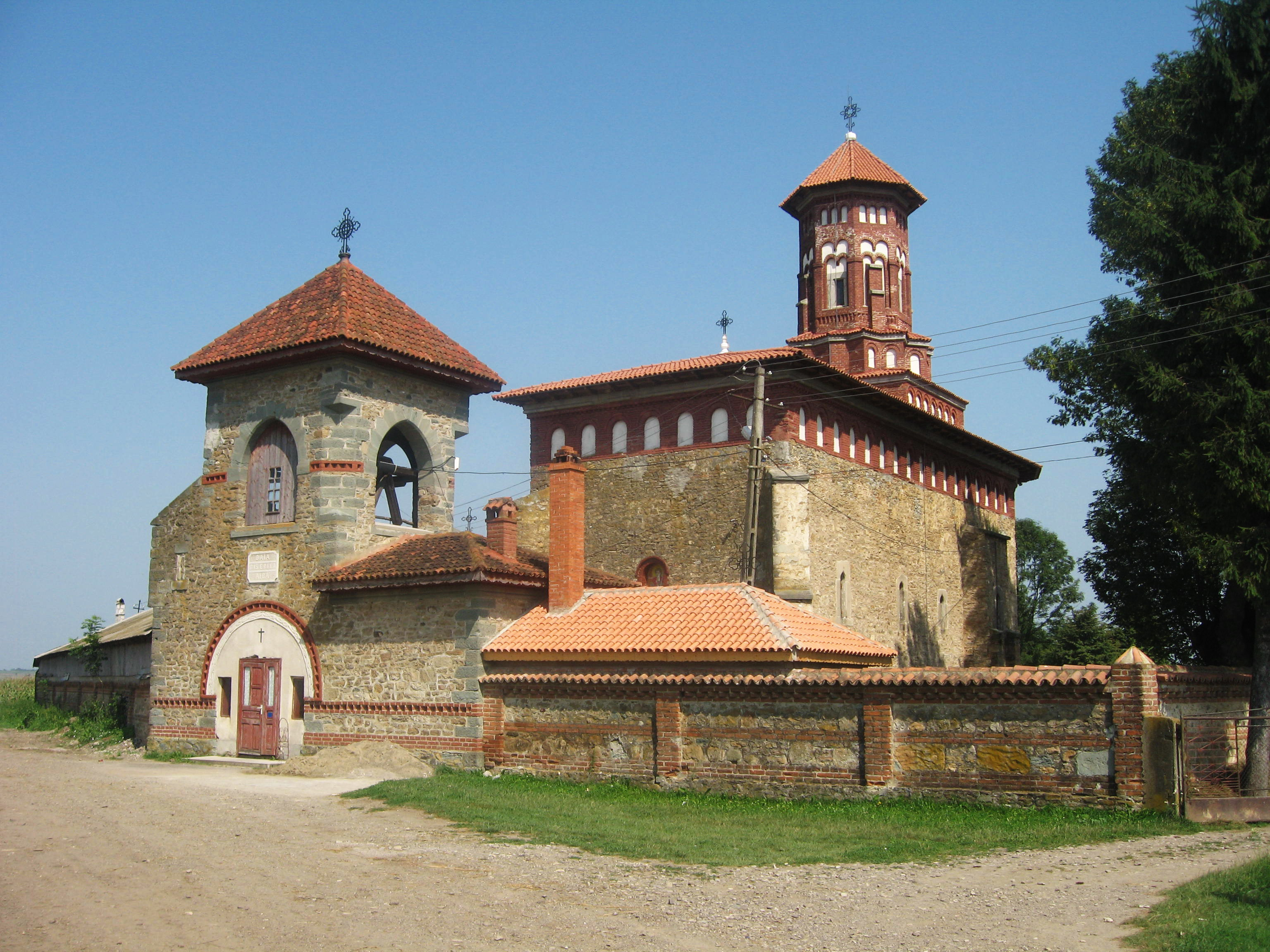 Biserica Albă din Baia